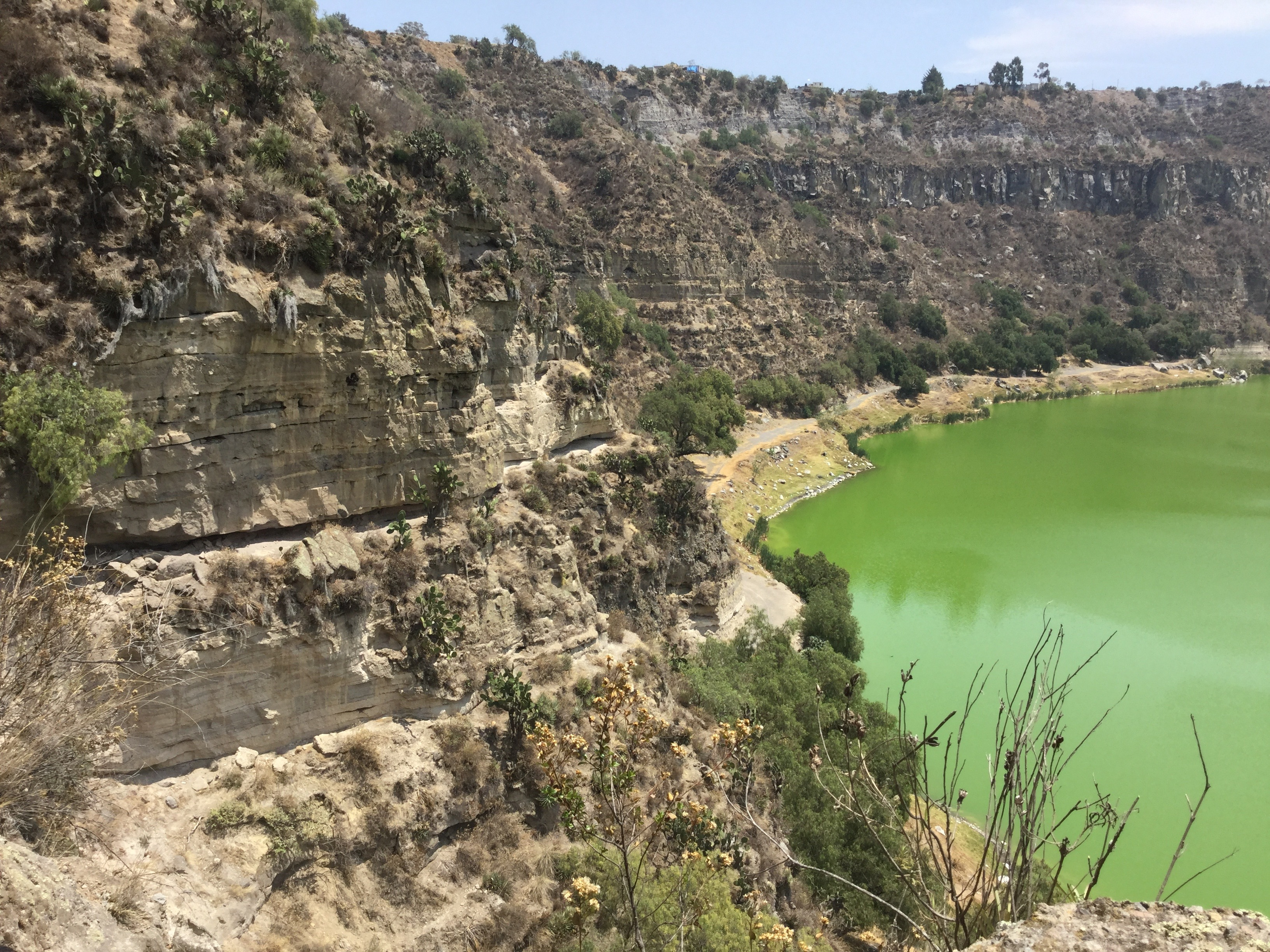 Lago carácter Aljojuca, el color verde del agua se debe a un Bloom propiciado por microalgas llamadas Crisofitas.